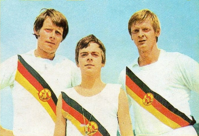 Wolfgang Gunkel, Klaus-Dieter Neubert, Jörg Lucke. MUNCHEN/MONACO '72-PANINI-Figurina n.155- 2 CON-DDR-CANOTTAGGIO